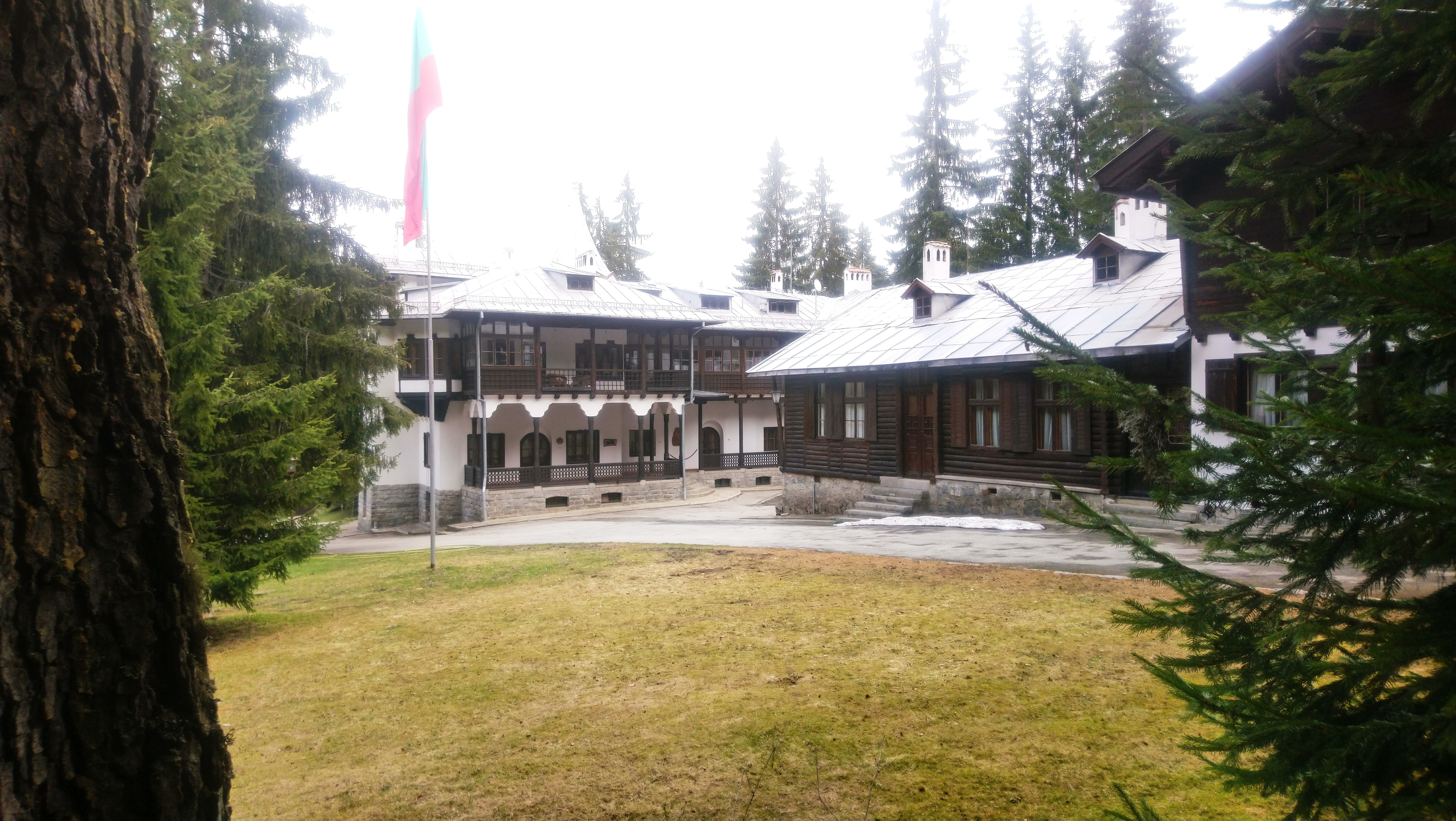 Царска Бистрица